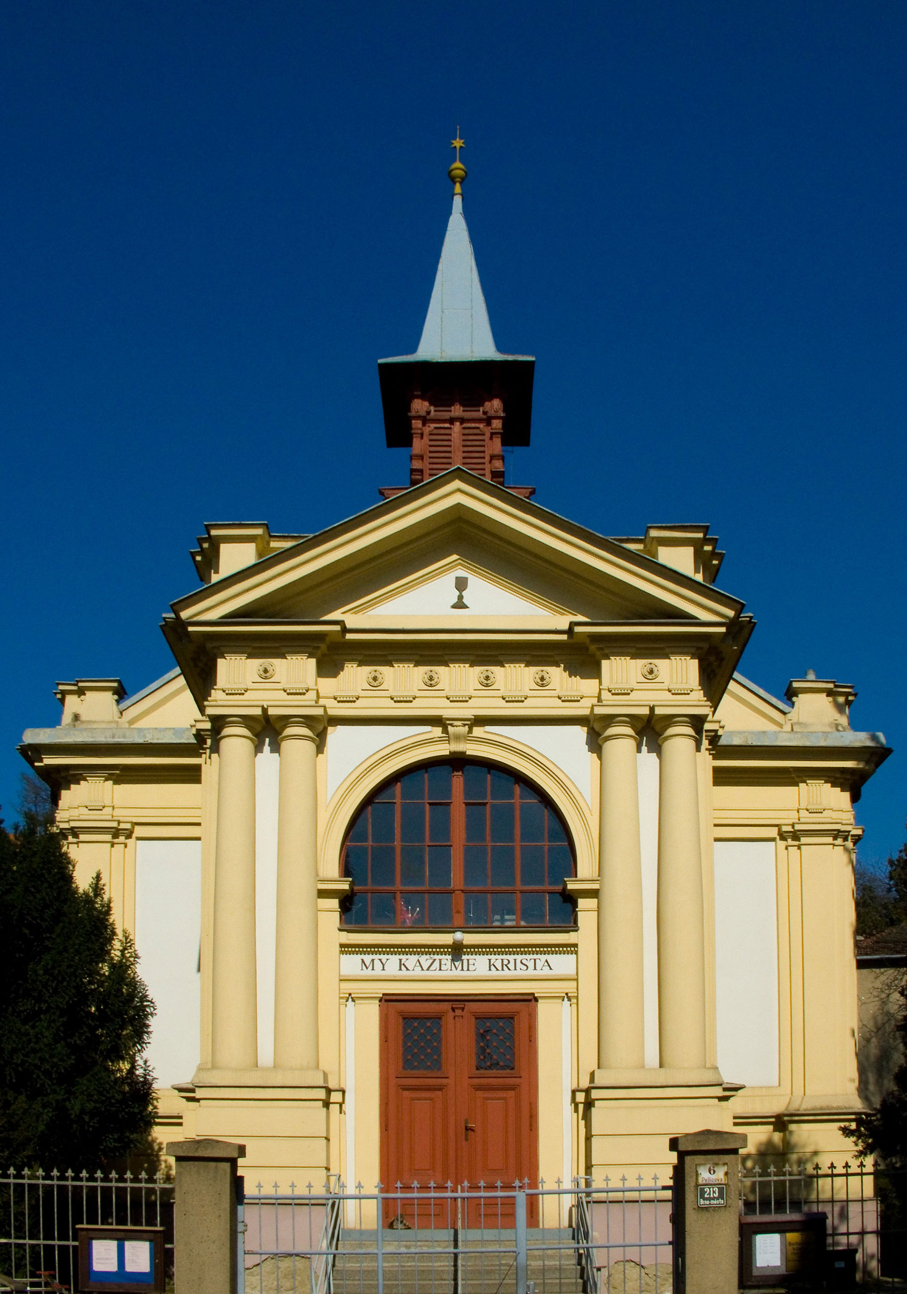 Betlémský kostel Českobratrské církve evangelické na adrese Pellicova 6